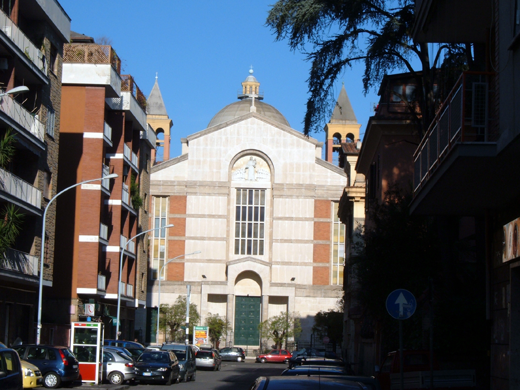 Chiesa di Sant'Antonio da Padova a Circonvallazione Appia, a Roma, nel quartiere Appio Latino.